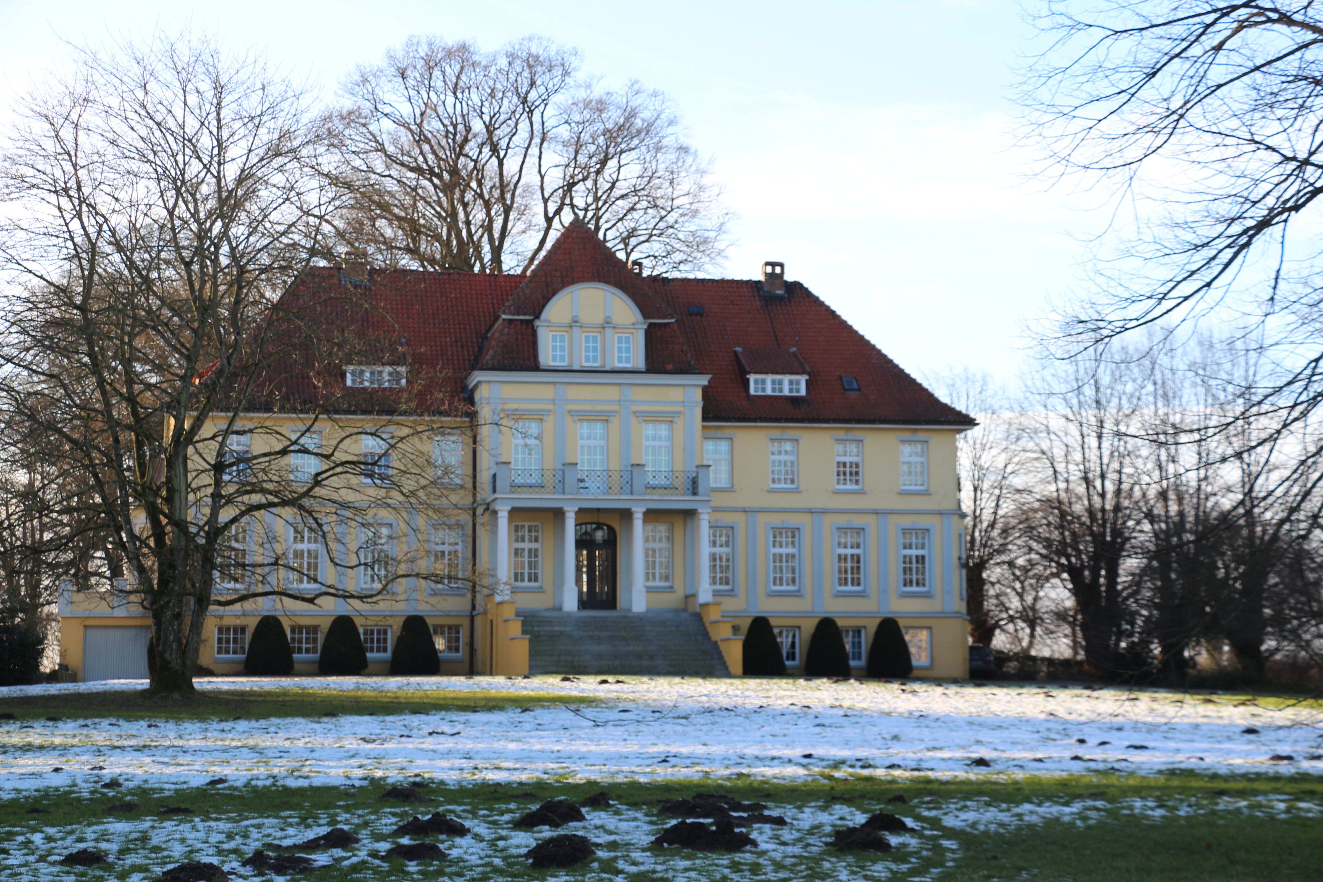 Warleberg Guthaus